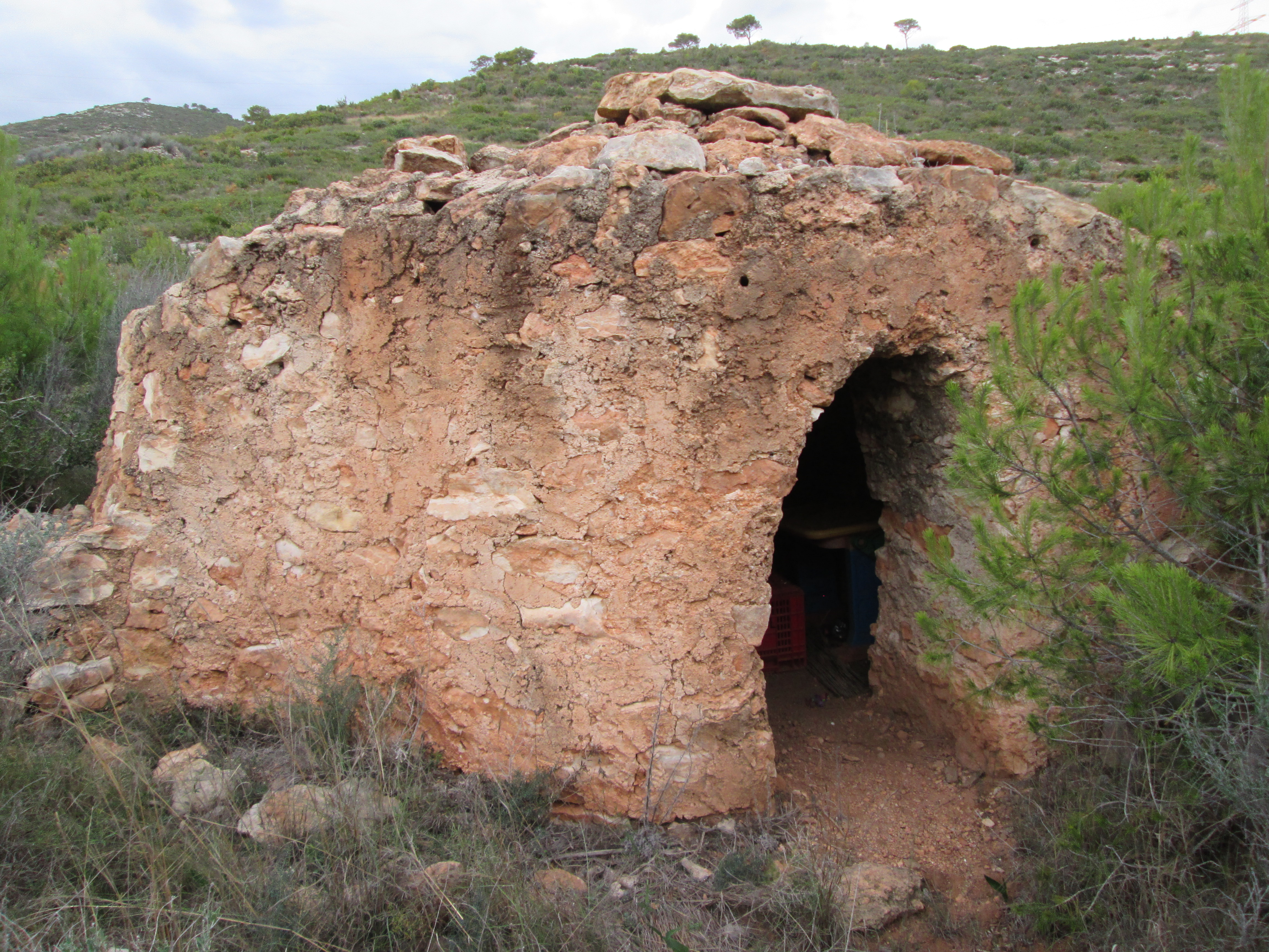 Chozo de agricultor/Siglo 17